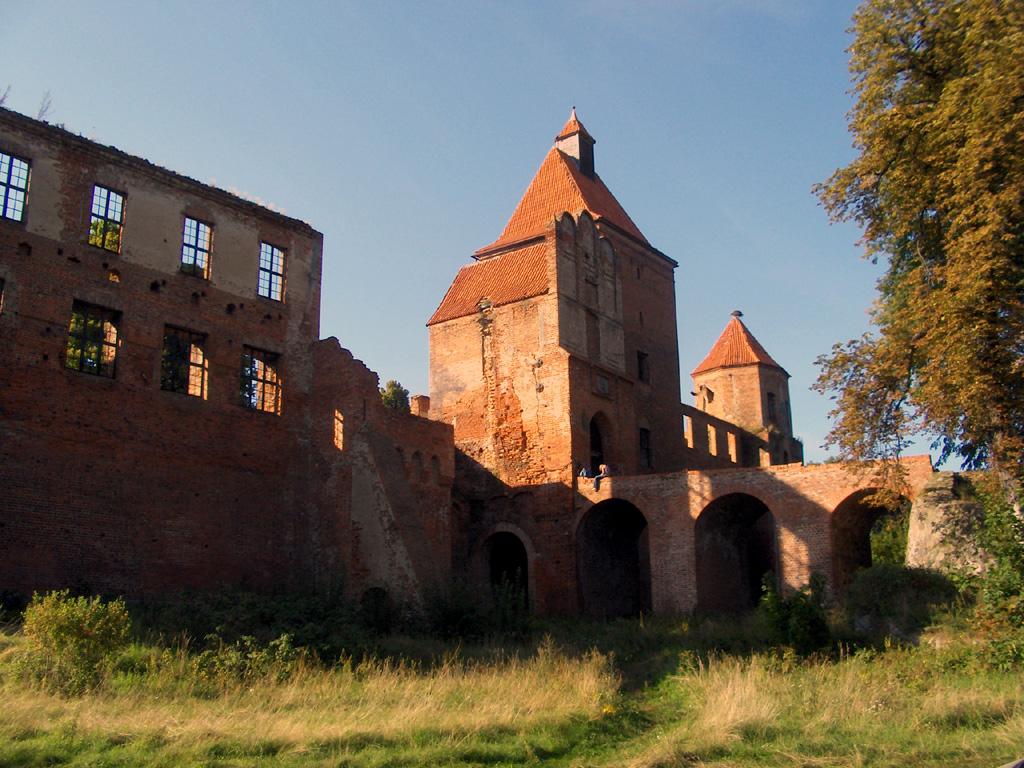 Schlossruinen in Szymbark/Polen